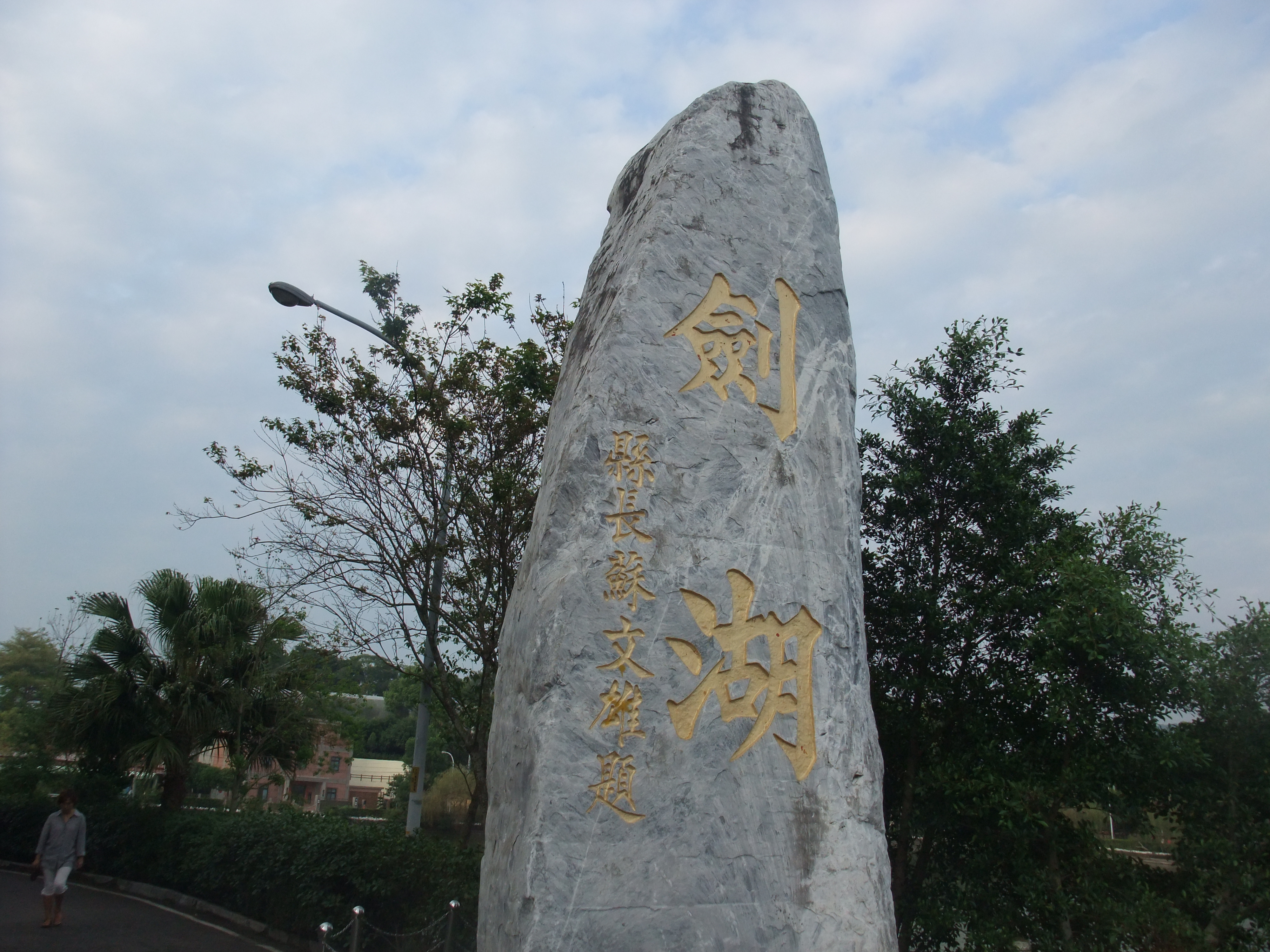 雲林縣古坑鄉劍湖石碑